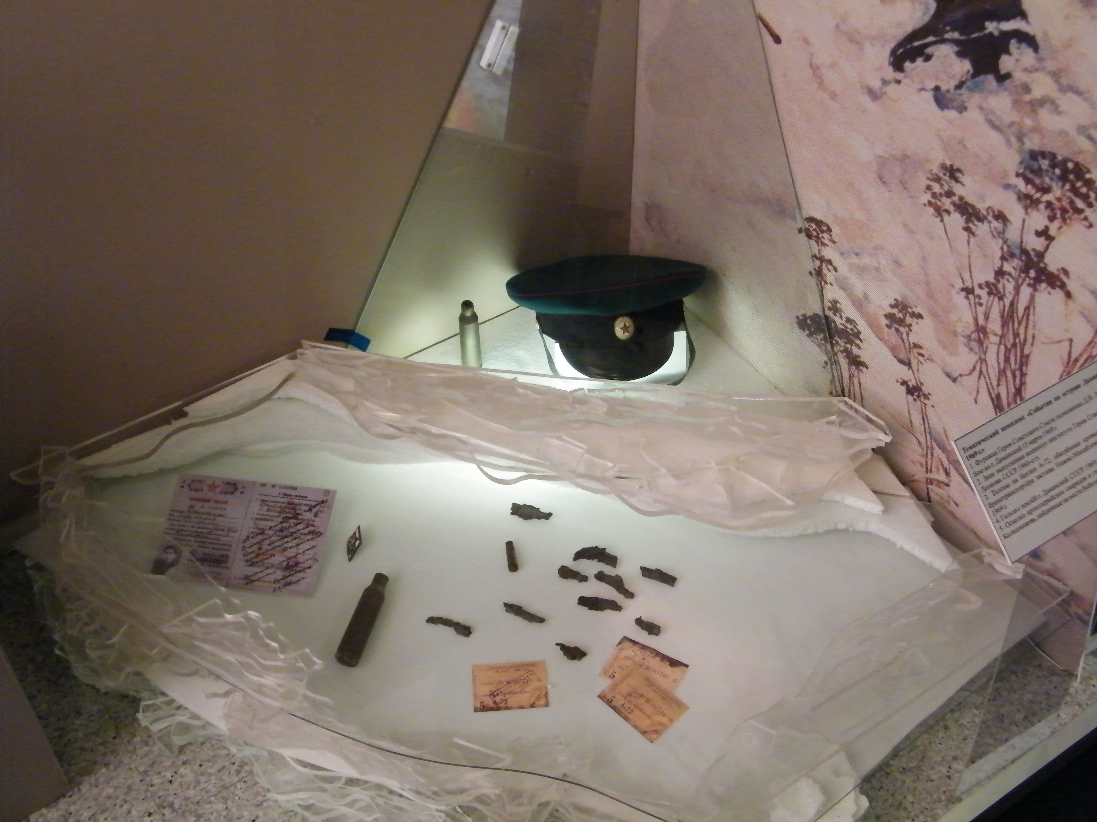 Личные вещи Героев Даманского, Хабаровский краеведческий музей фото дек. 2012